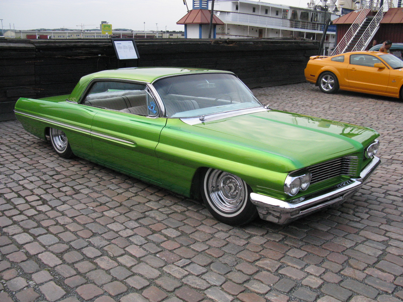 Pontiac Catalina 1962